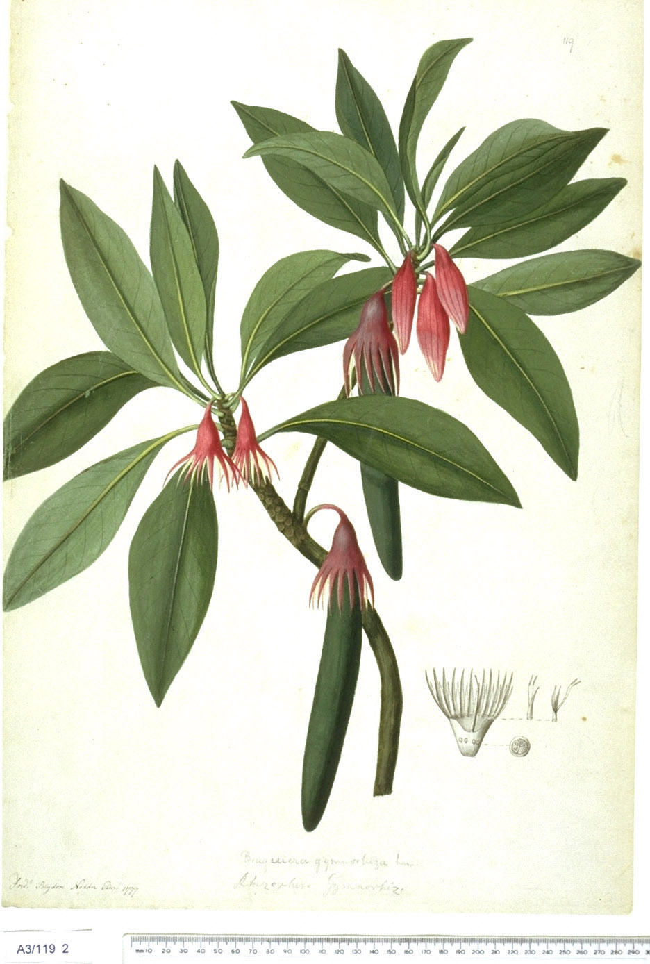 Bruguiera gymnorrhiza - Mangrove